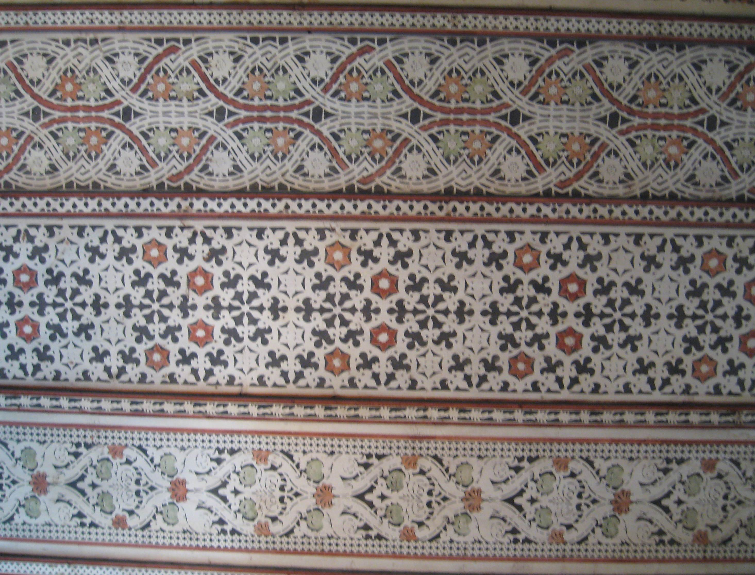 Dorfkirche Böllberg in Halle (Saale), an der Straße der Romanik. - OpenStreetMap(Info)